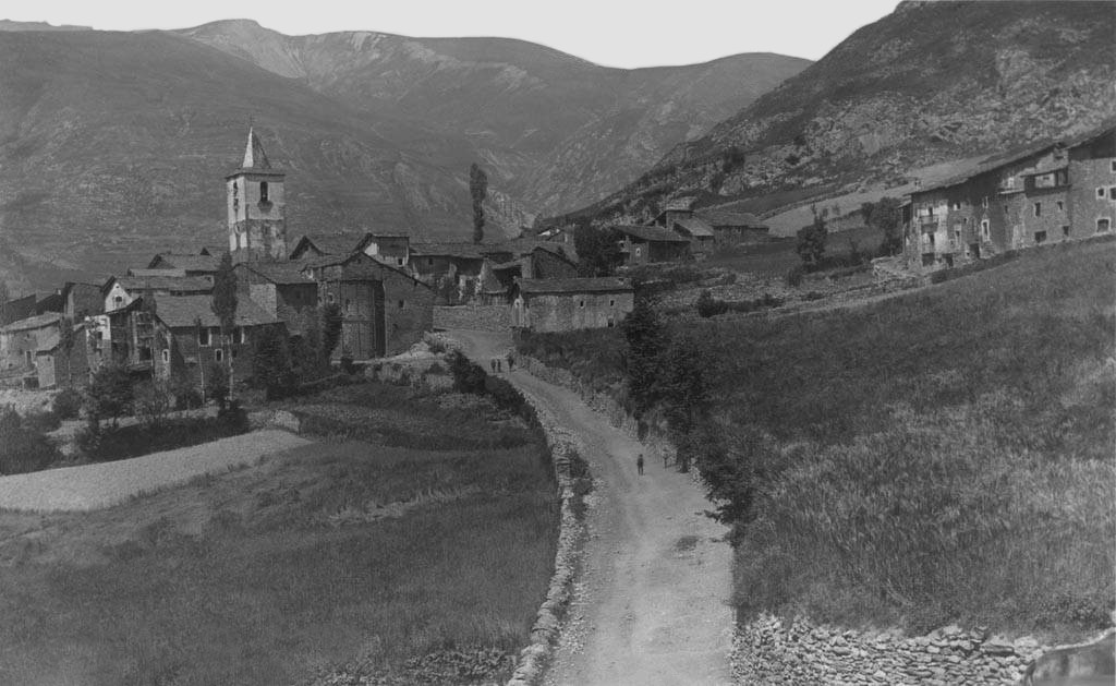 Vista general de Llessui. Juli Soler i Santaló (Entre 1890 i 1914)